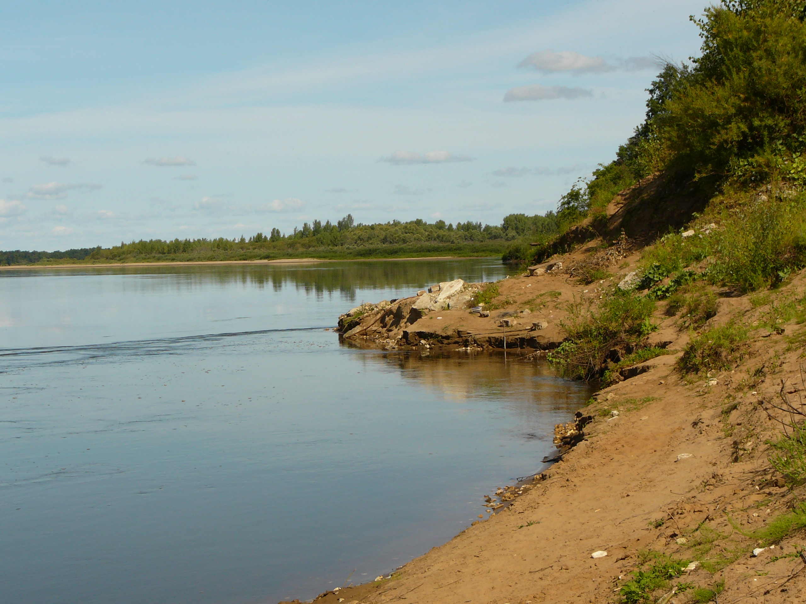 Берег Вятки